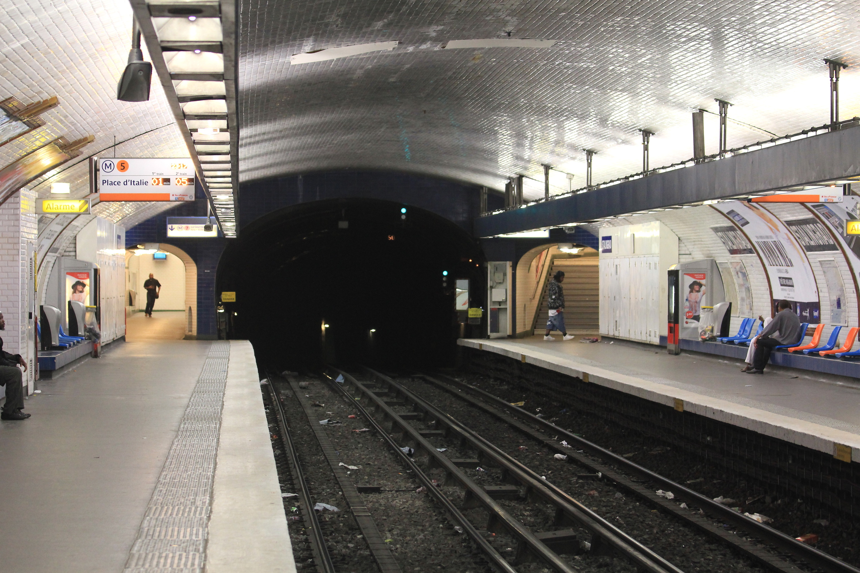 Quais de la station de métro parisien Stalingrad vus en direction de Bobigny.